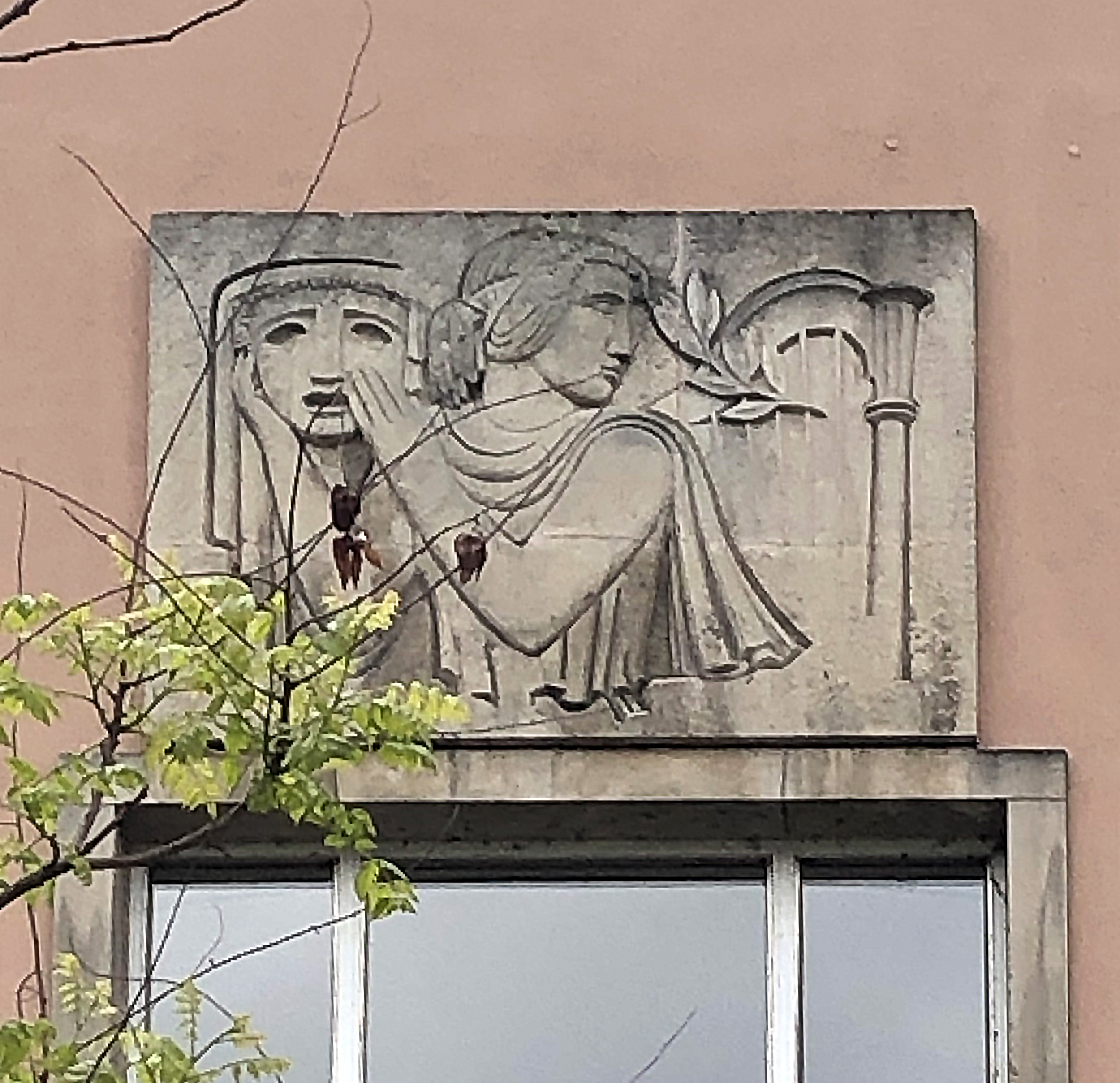 Deutsche Oper am Rhein, Relief von Ferdinand Heseding, Düsseldorf